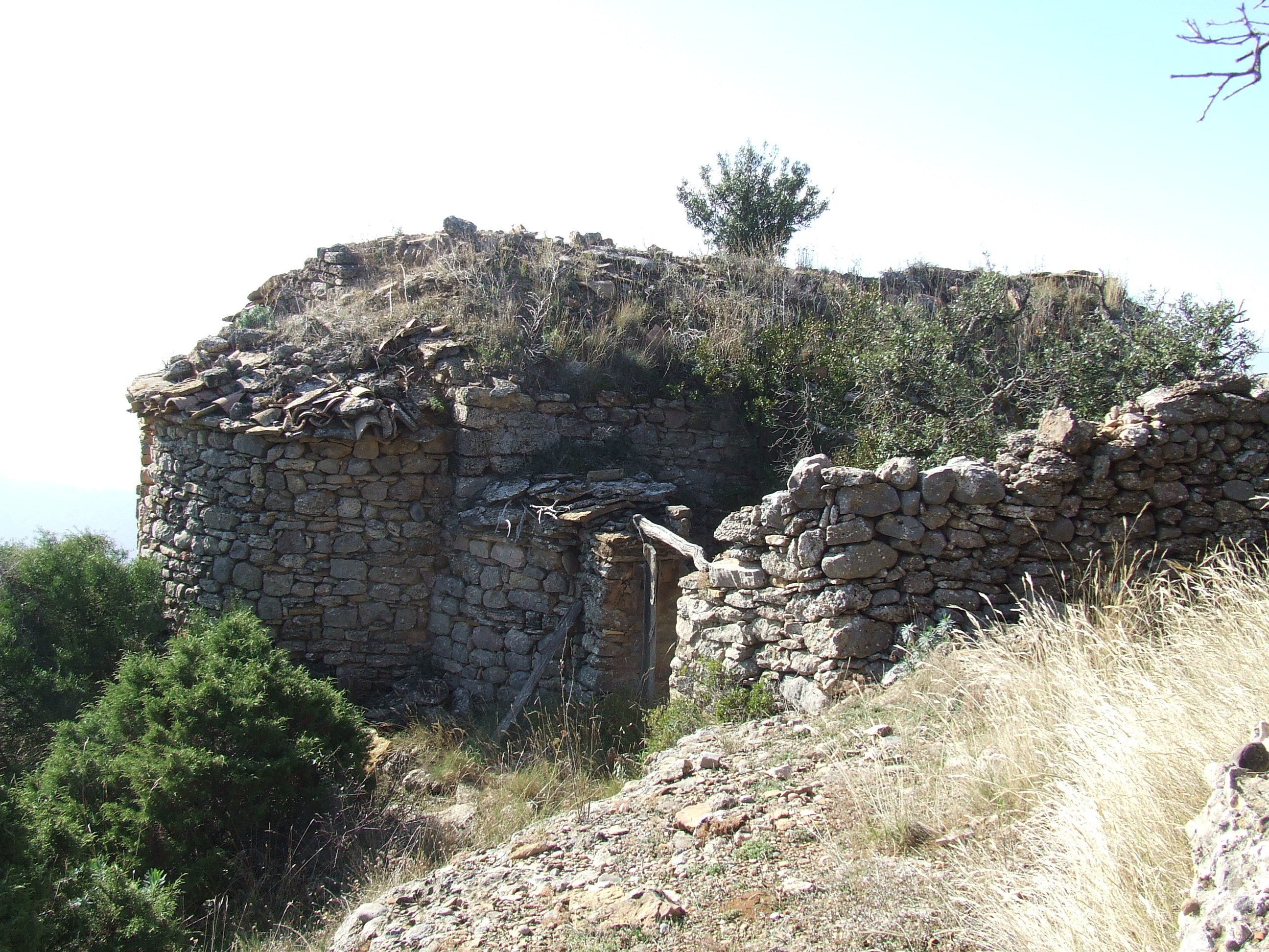 Església de Santa Anna de Montadó (Benavent de la Conca, Isona i Conca Dellà, Pallars Jussà)